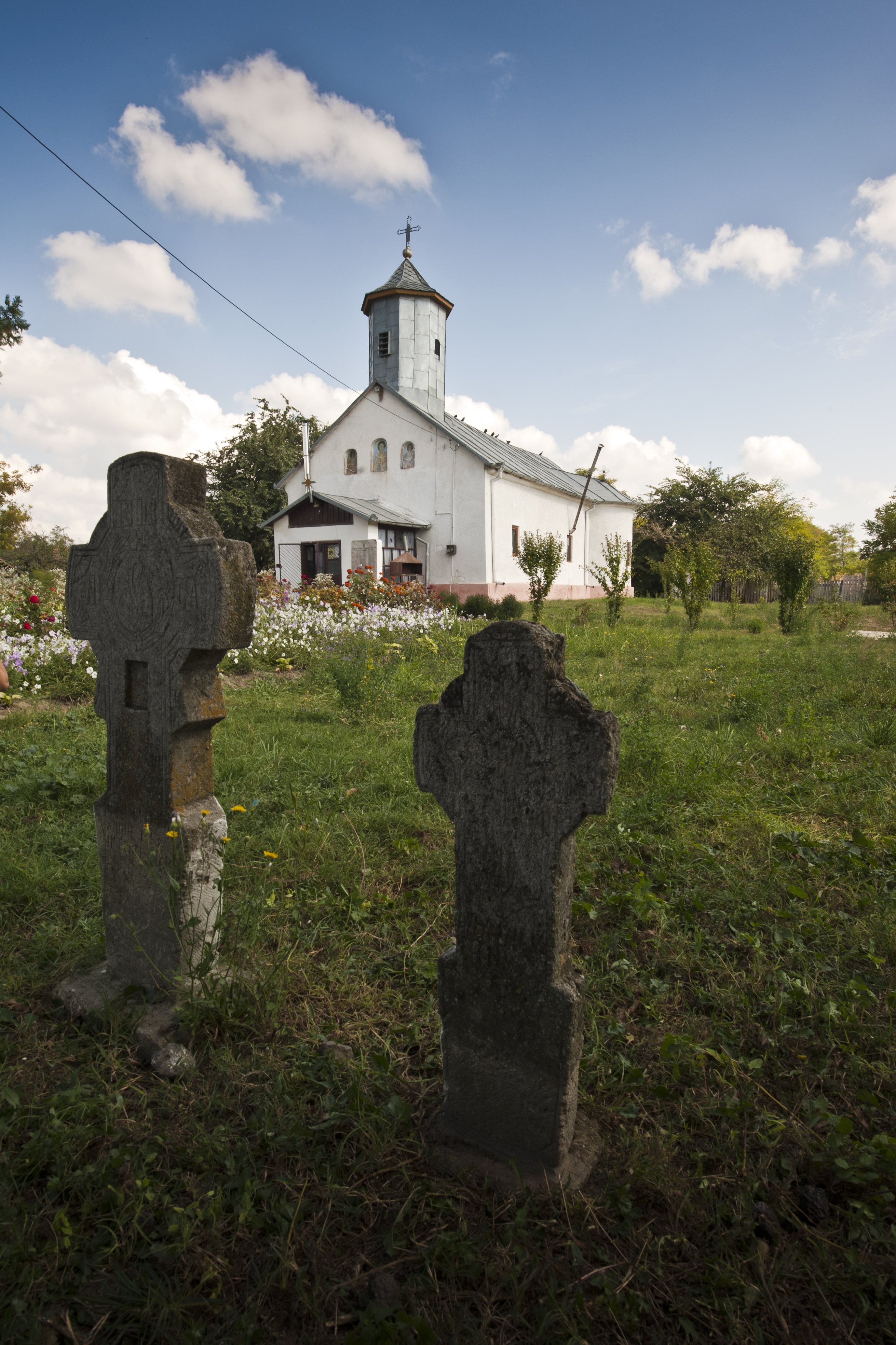 Biserica „Sf. Ierarh Nicolae”